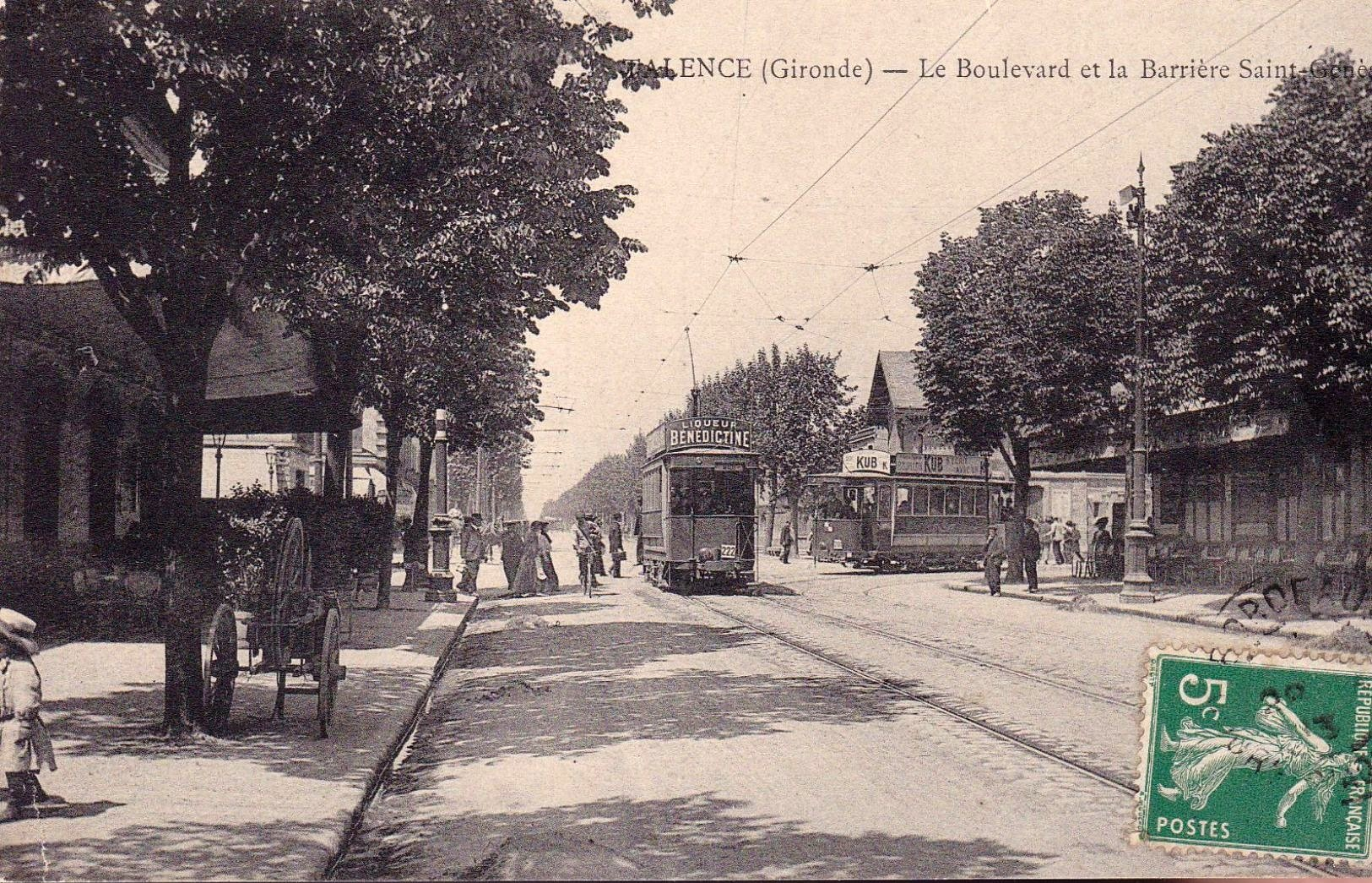 Talence